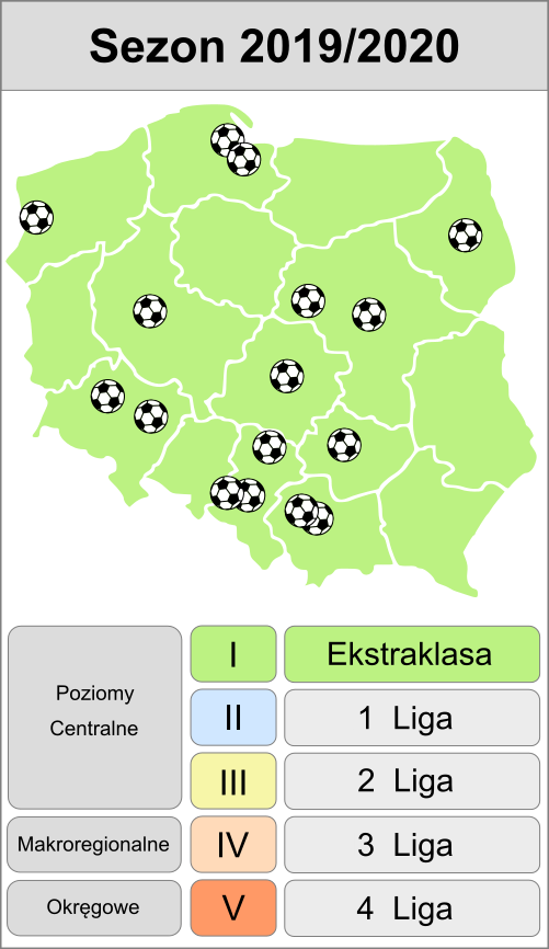 Zespoły występujące w ekstraklasie 2019/2020